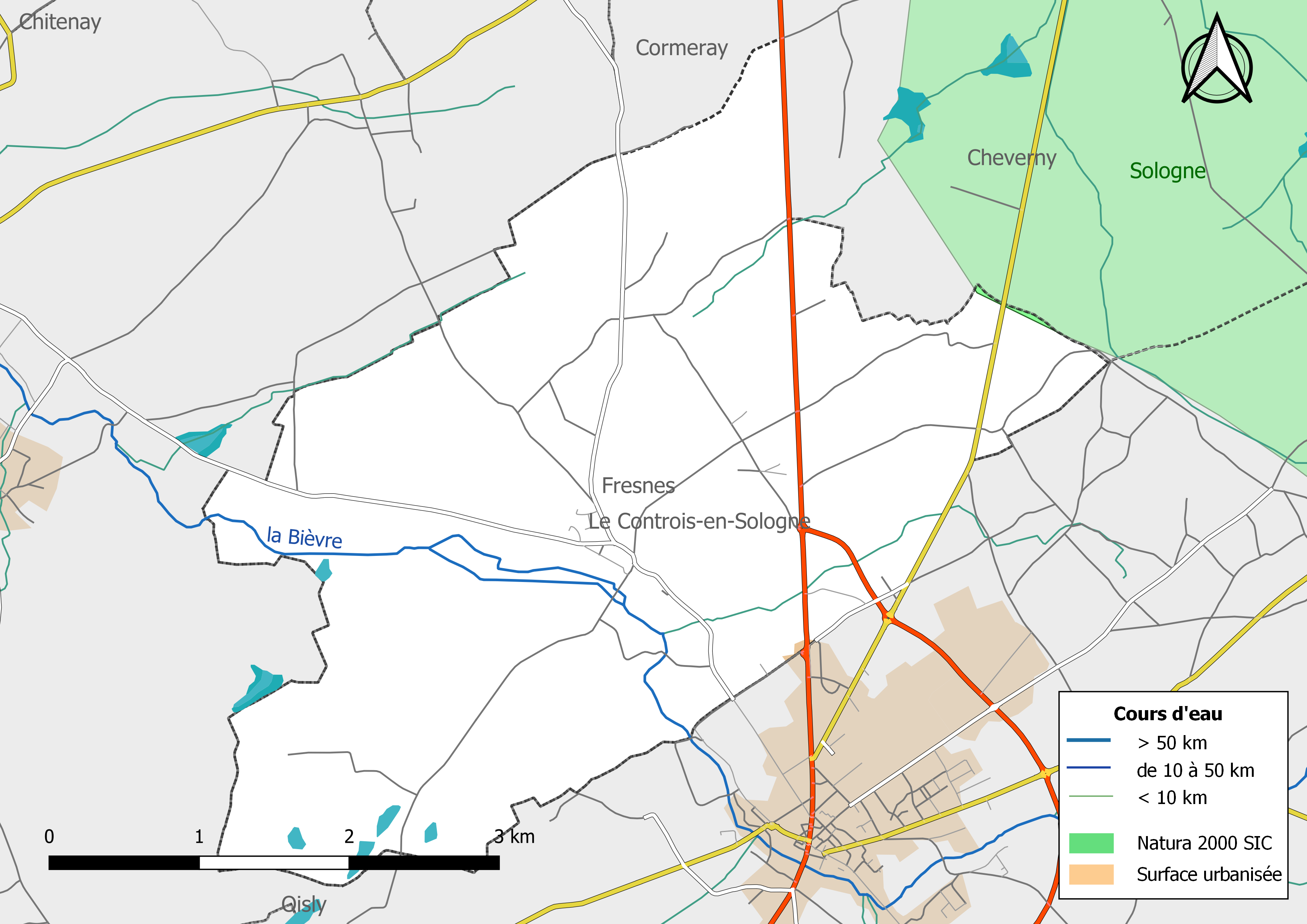 Zones Natura 2000 de type SIC de la commune de Fresnes (Loir-et-Cher) (France).